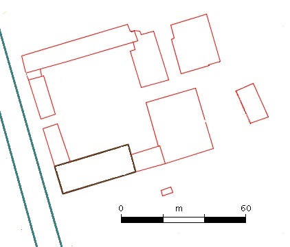 Plan de la Ferme de MONT-SAINT-JEAN (Braine l'Alleud)